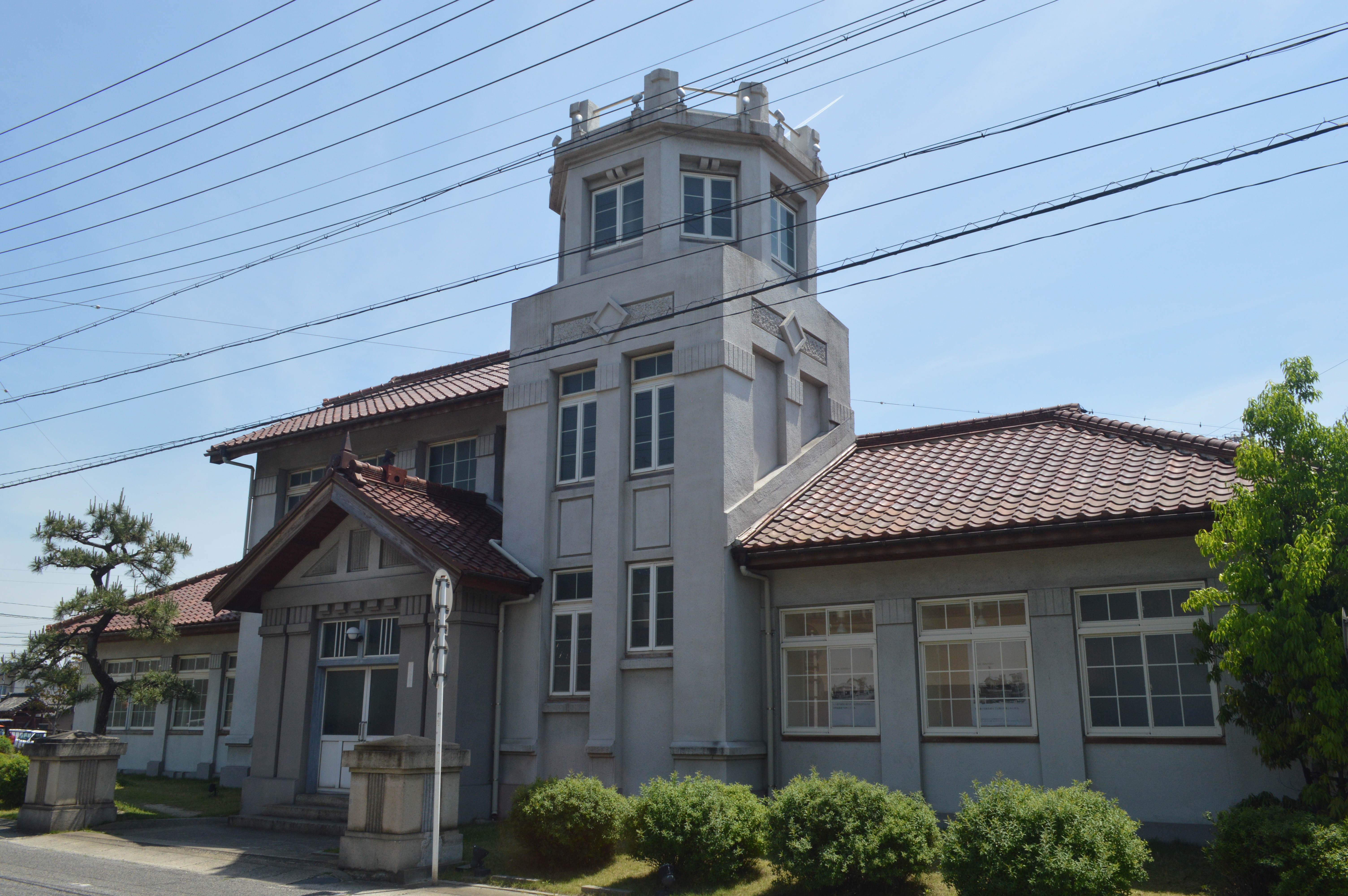 愛知県碧南市の旧大浜警察署。1924年竣工。